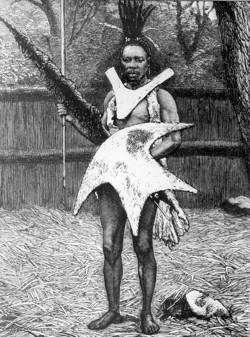 Guerrier sotho vers 1880. Gravure du XIXème siècle.